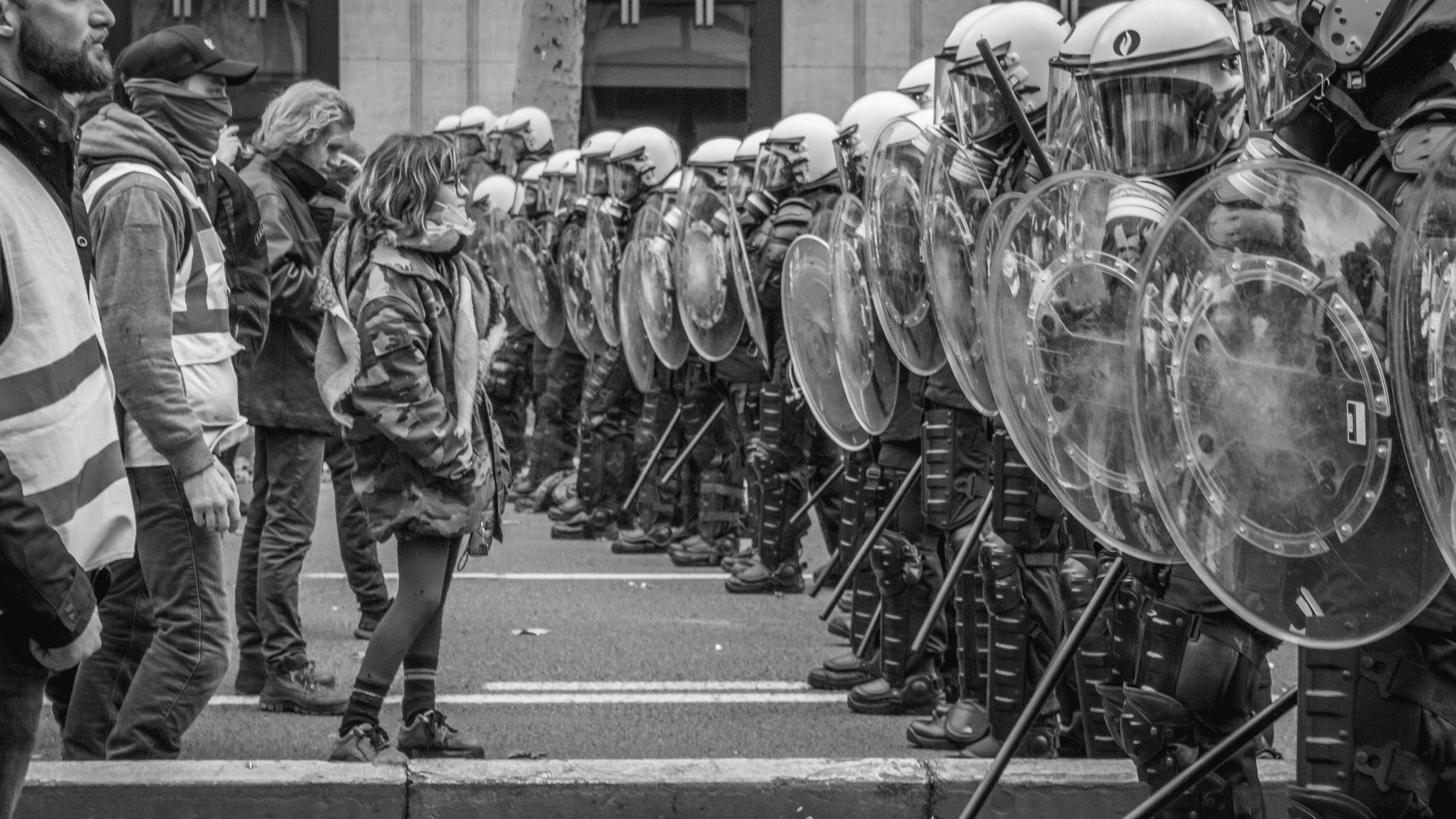 Gele hesjes - 2018